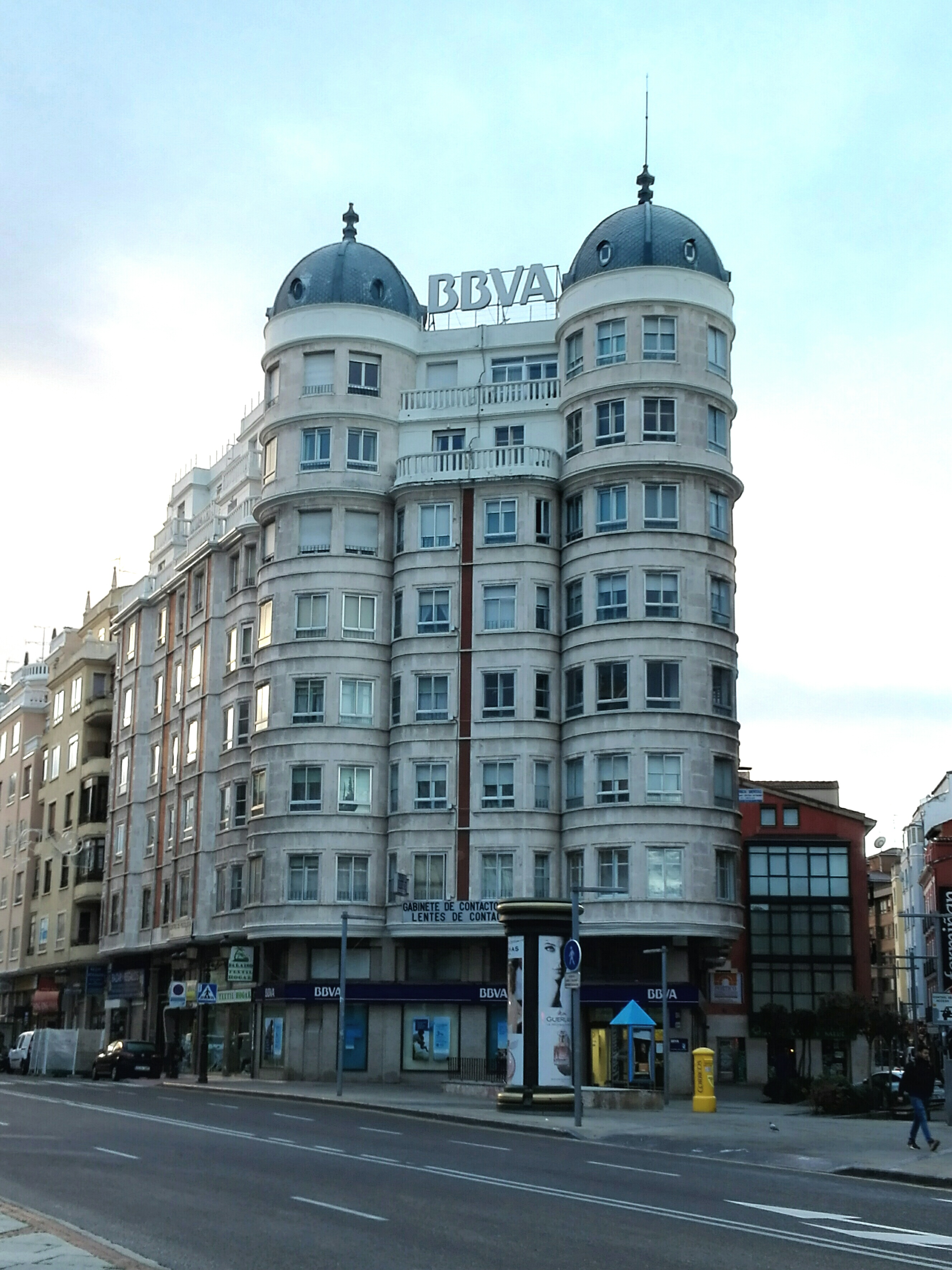 Edificio nº 2 de la calle Madrid (Burgos, España) ;diseñado por el arquitecto burgalés Martín Tárrega y construido sobre parte del antiguo solar del Convento de San Luis, se proyecta este moderno edificio cuyo tratamiento volumétrico y amplias superficies revocadas enlaza con modelos de la década anterior.